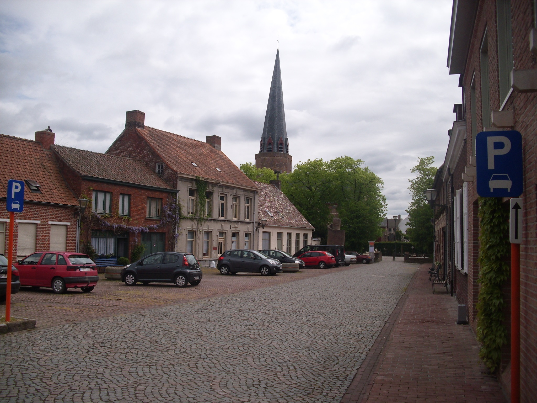 Kleine Markt - Watou - Poperinge - West-Vlaanderen - België